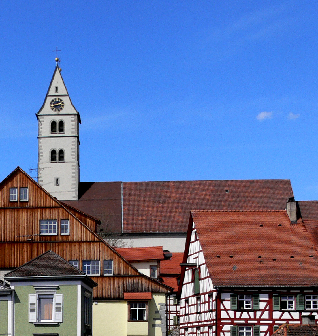 Kath. Pfarrkirche Mariä Heimsuchung, Meersburg (Bodenseekreis)